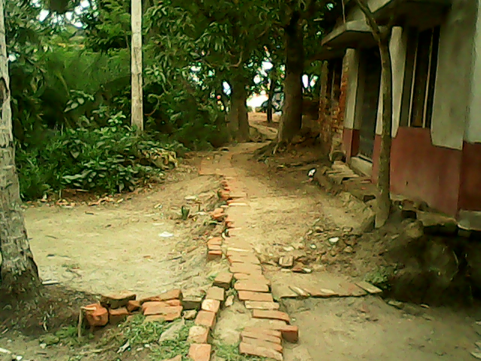 Jhuruli mazer para part